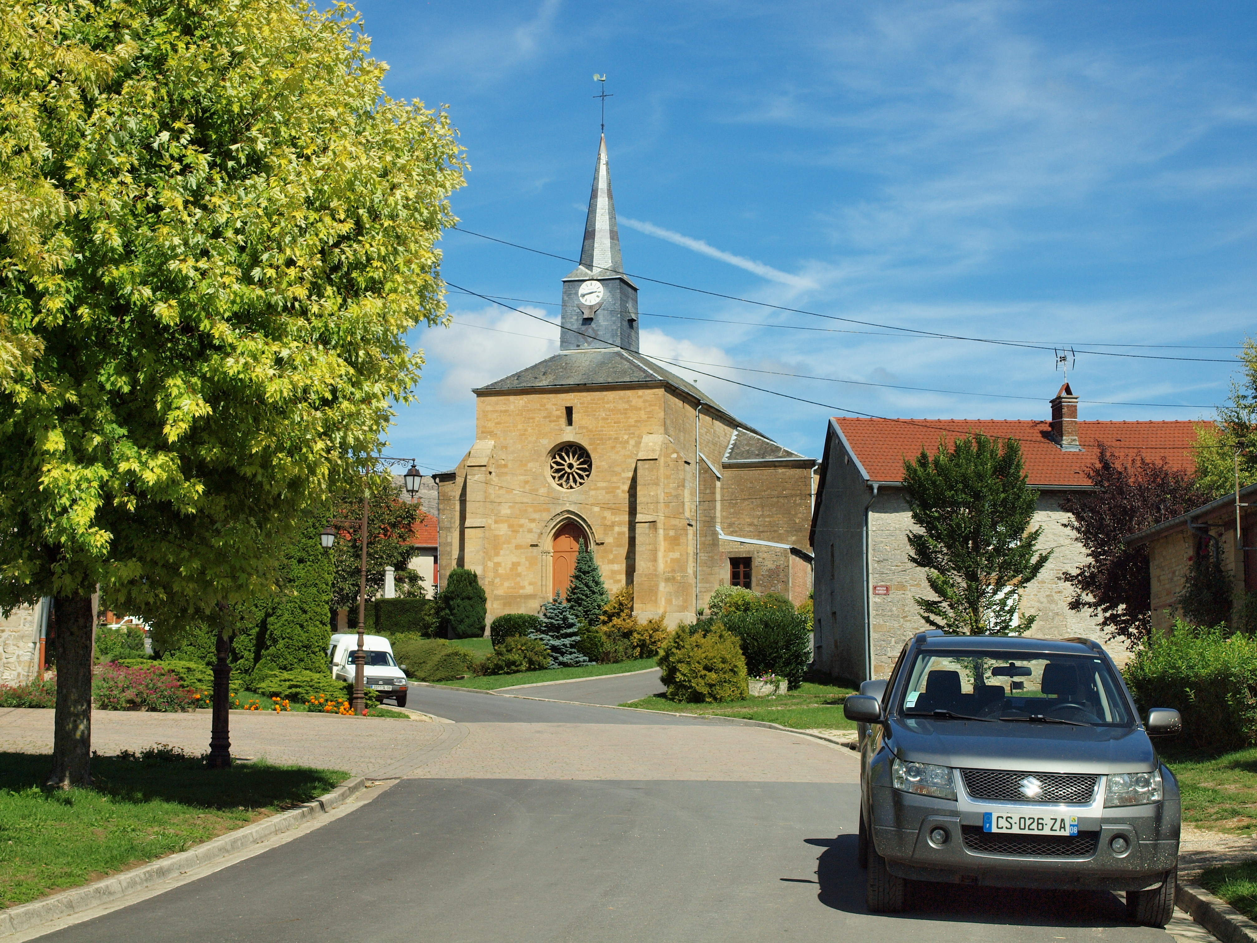 Bar-lès-Buzancy (Ardennes, France)